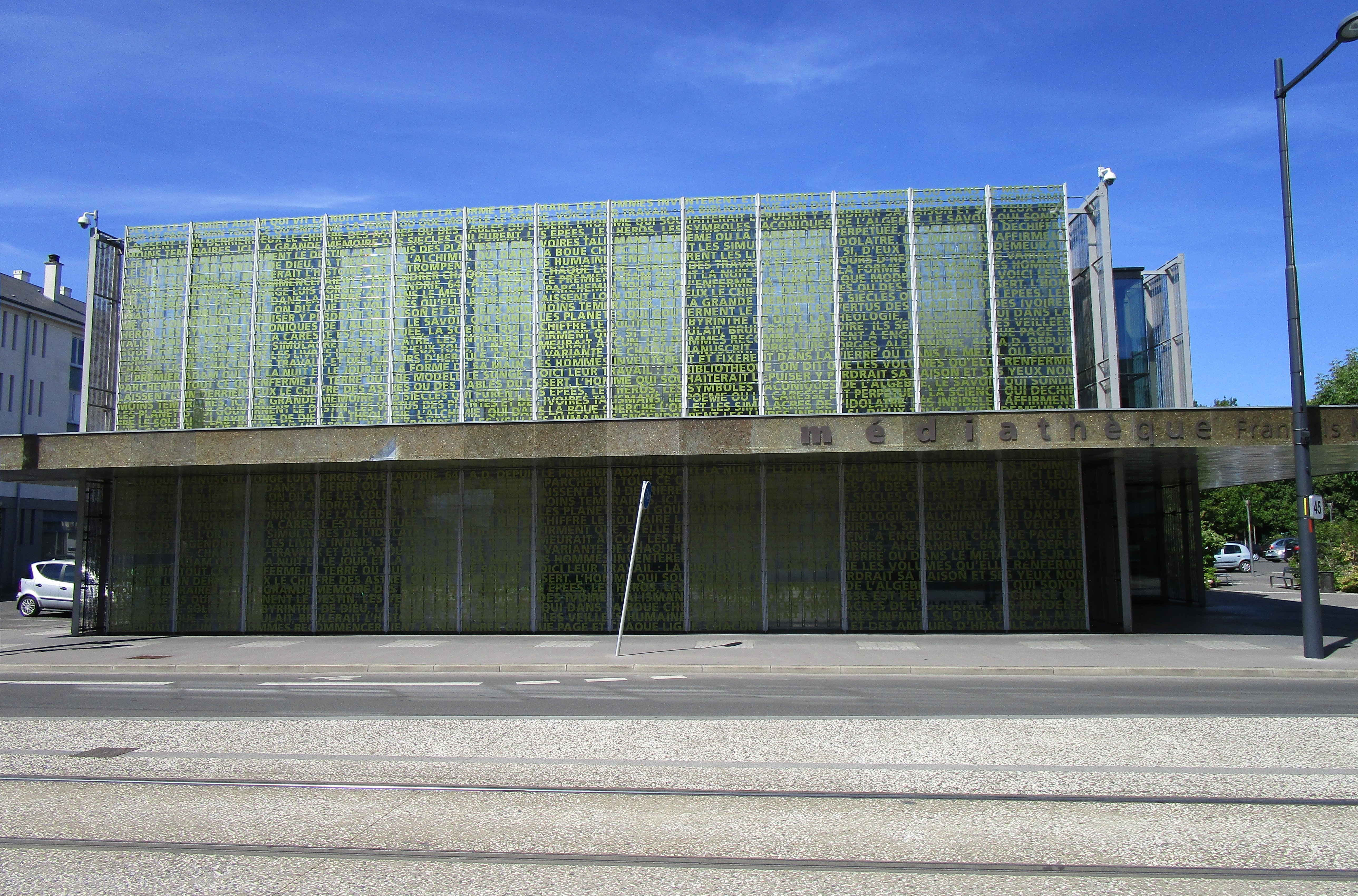 La Médiathèque François Mitterrand, dans le quartier Beffroi-Europe, à Tours Nord.